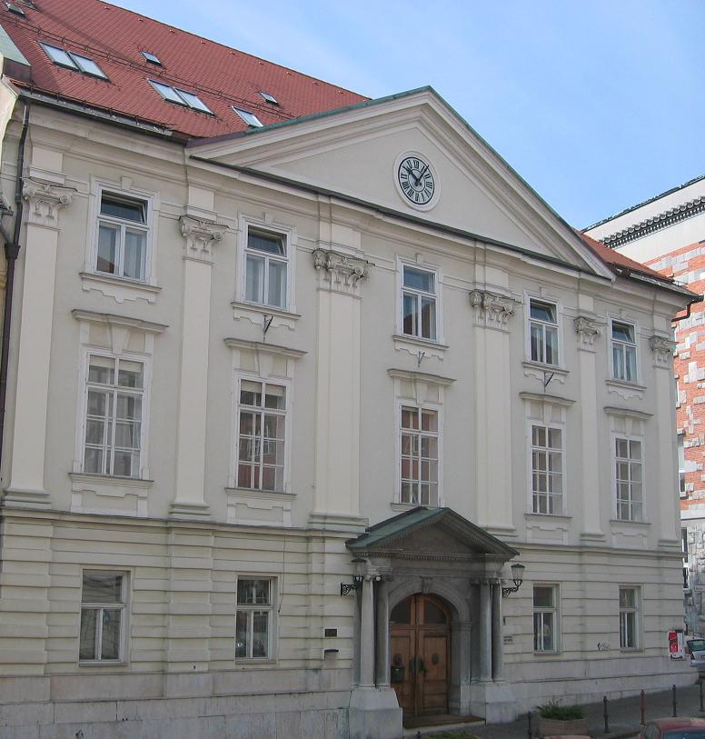 SAZU - SLOVENIAN ACADEMY OF SCIENCES AND ARTS, Ljubljana (main building). Photo: Ziga 13:32, 26 April 2006 (UTC)